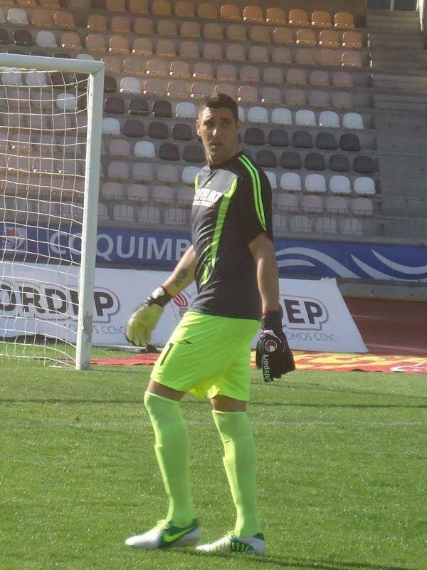 Juan Carlos Caballero En Dep La Serena